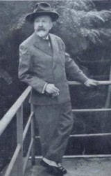 ak. mal. Šimůnek Karel 1869-1942